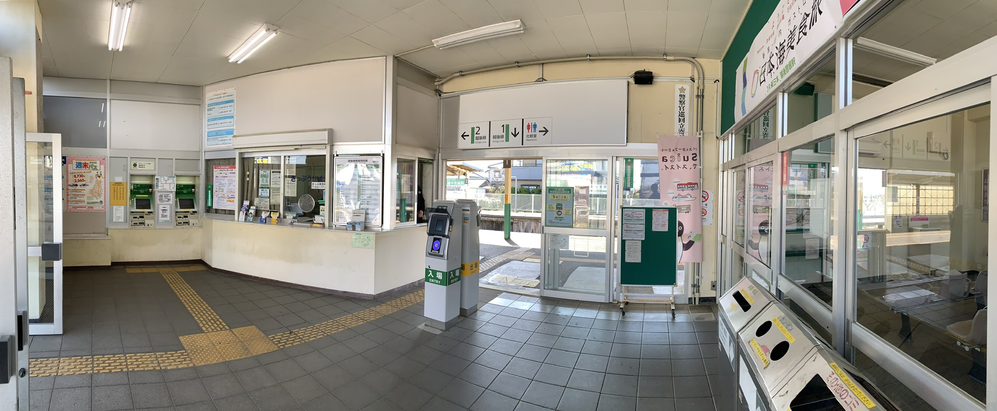 越後曽根駅の改札口・券売機周辺（2019年3月）